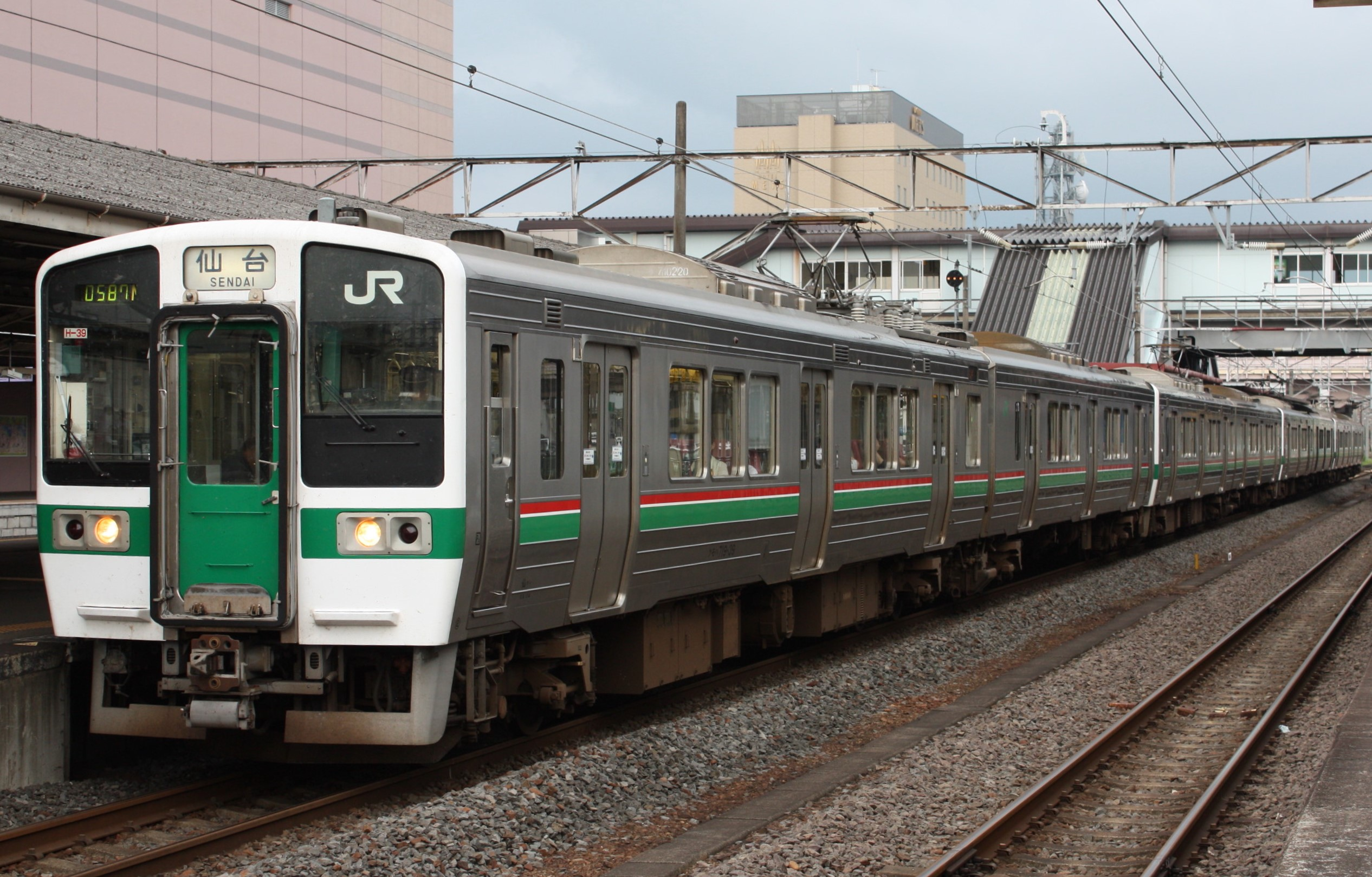 719系仙台車両センター所属H-39編成